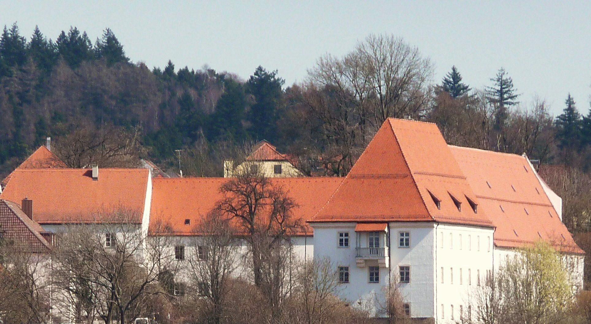 Das Schloss in Bad Griesbach